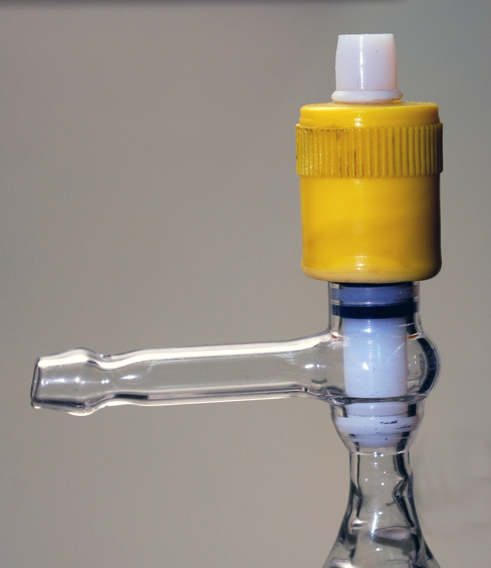 Young's tap